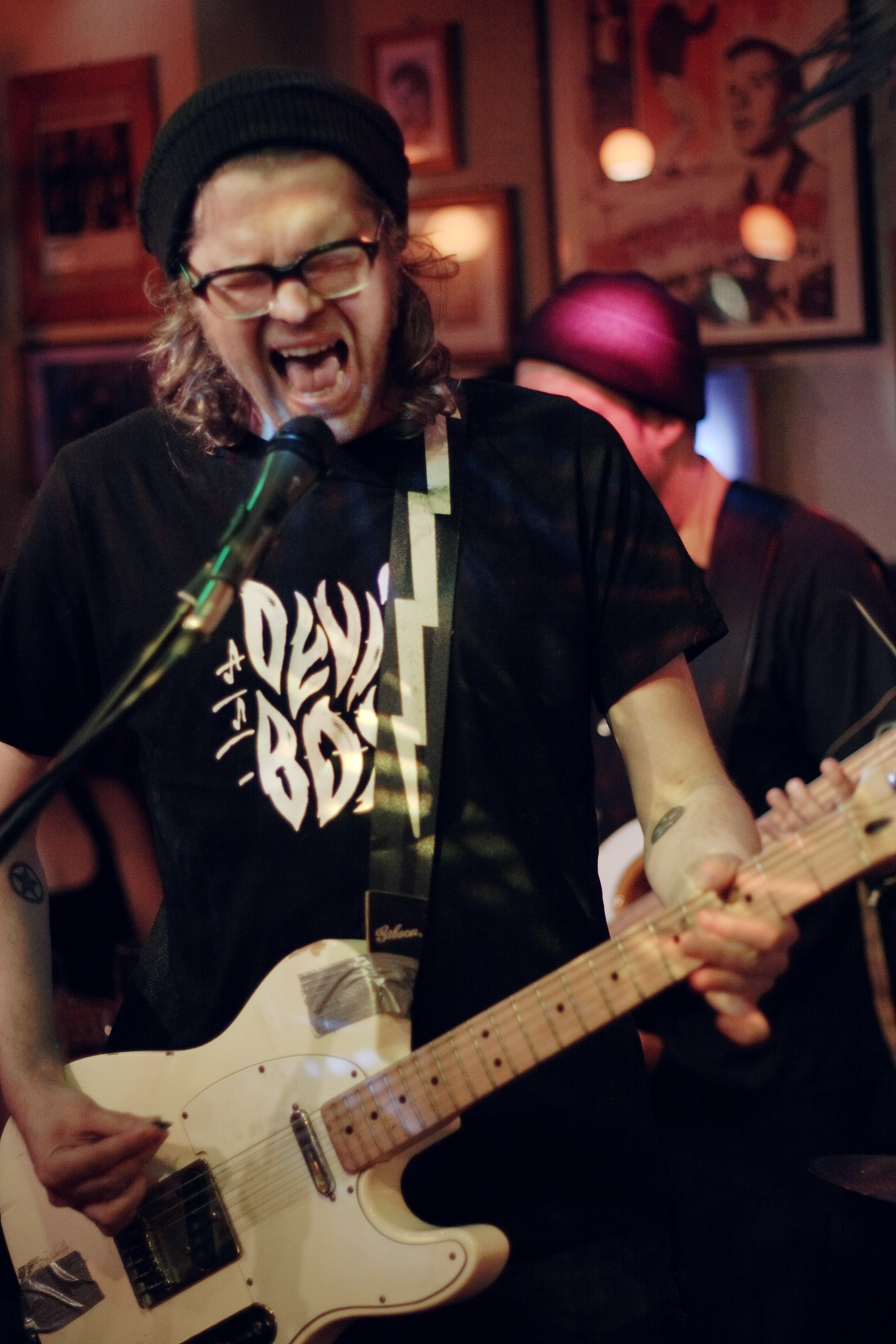 Ville Pirinen